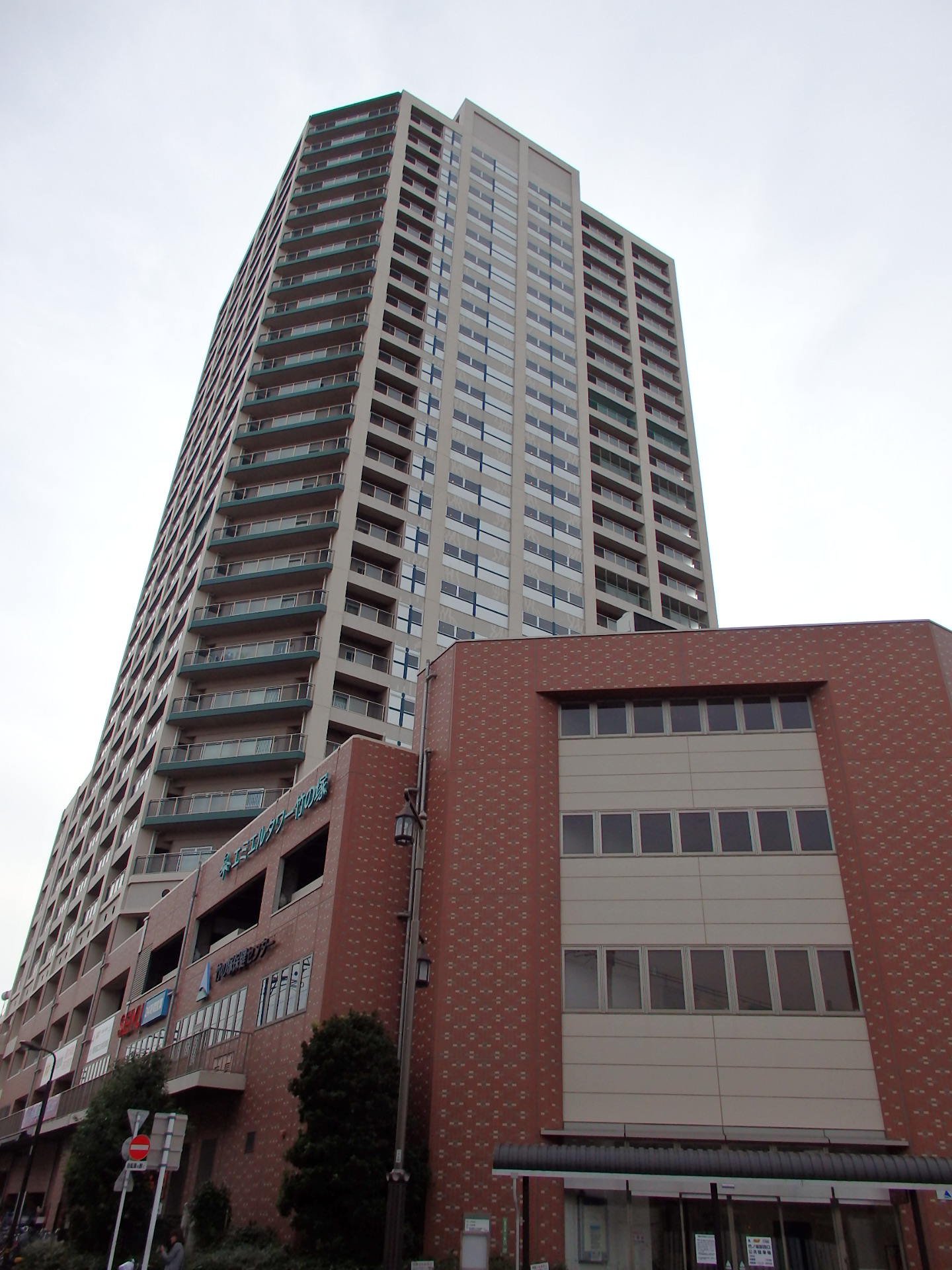 エミエルタワー竹の塚